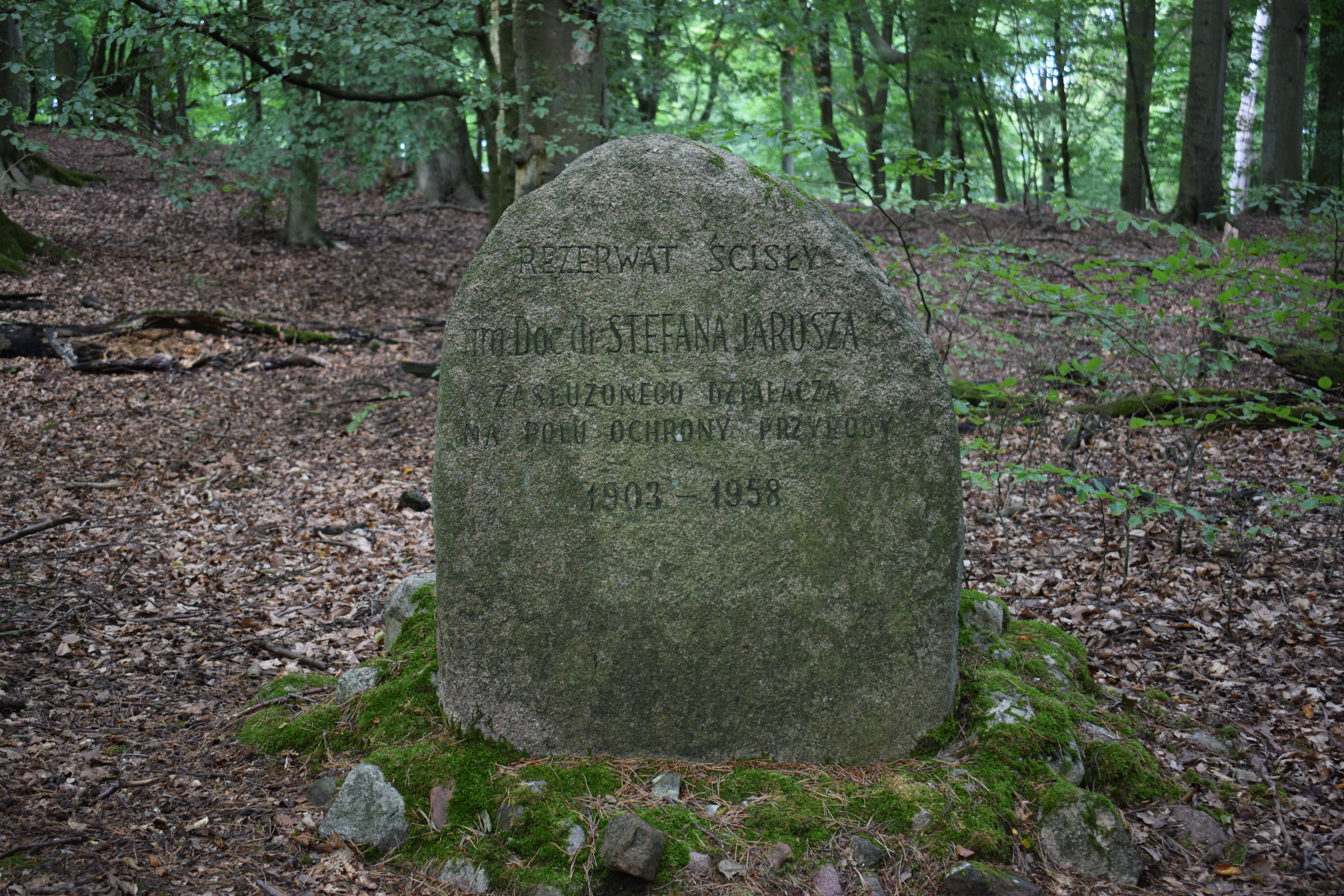 Gedenkstein für Stefan Jarosz (1903-1958) im Nationalpark Wolin.